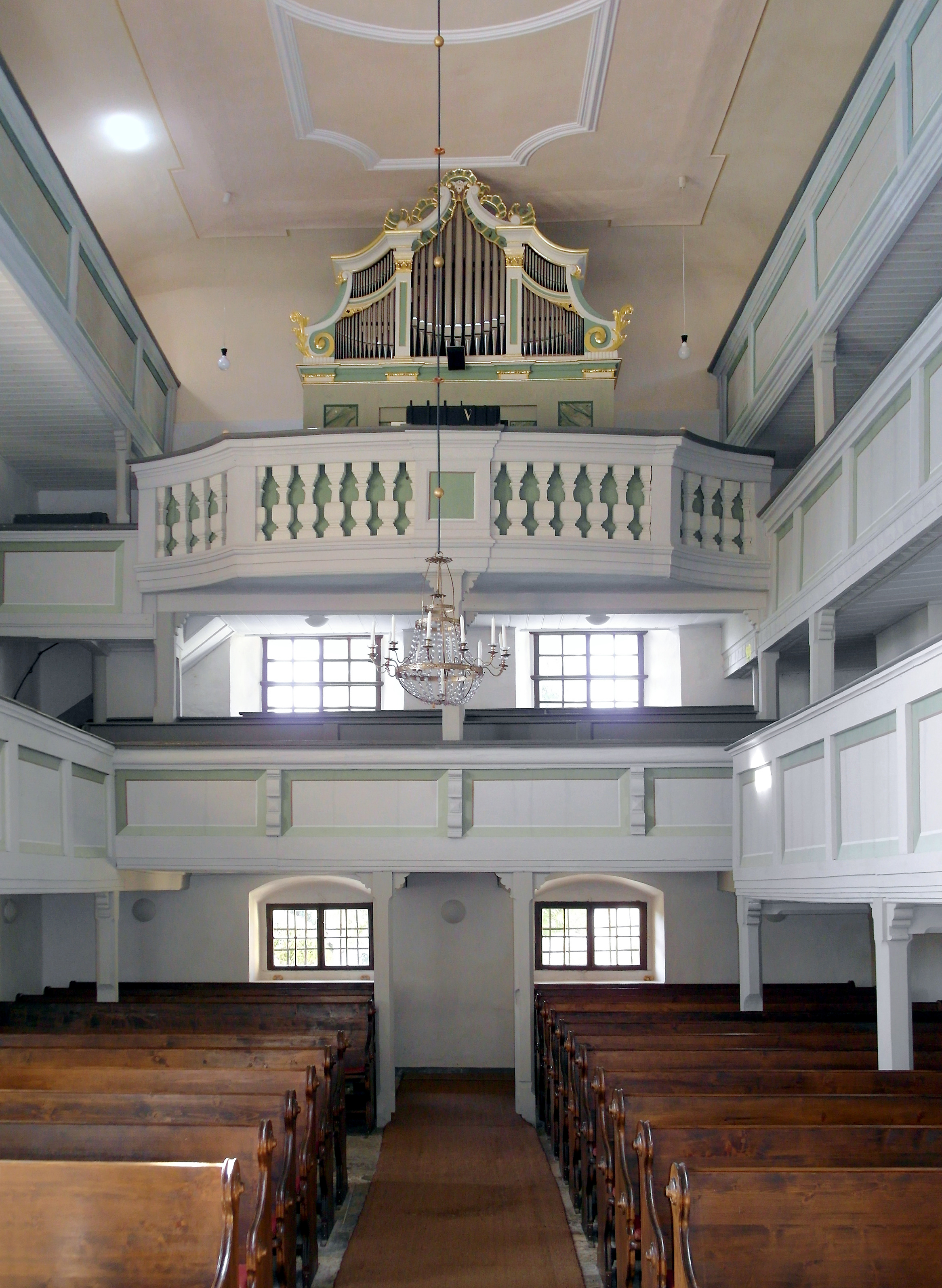 02.04.2016 01796 Struppen: Struppener Kirche, Kirchberg 1. Die Kirche wurde vom Deutschritterorden erbaut. Ersterwähnung Struppens war 1275, da stand d. romanische Kirche schon. Heutige Kirche von 1740. Älteste Orgel der Sächsischen Schweiz, 1668 erbaut und 1736 erweitert. [SAM4034.JPG]20160402535DR.JPG(c)Blobelt